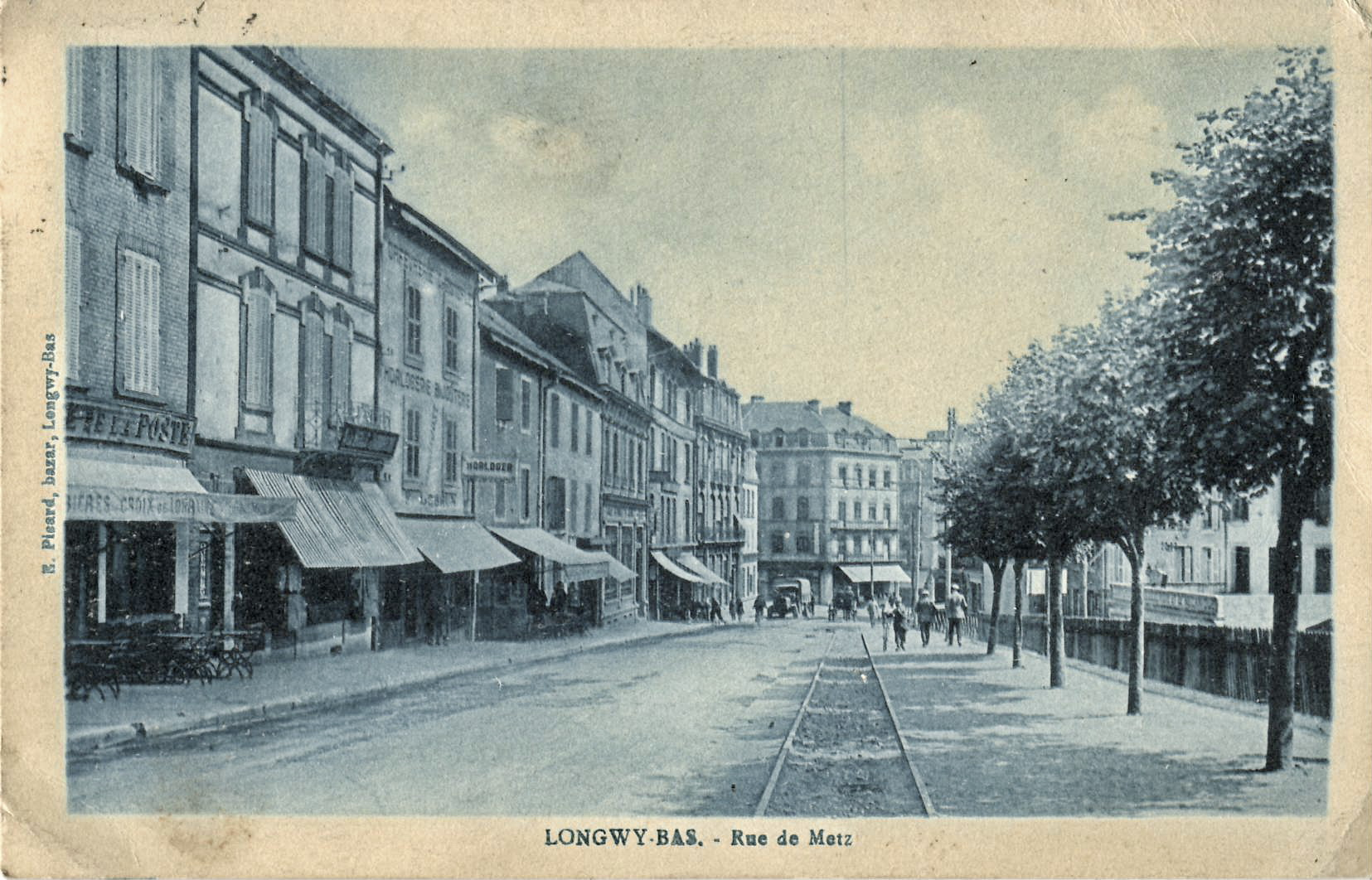 Carte postale ancienne éditée par E. Picard, bazar à Longwy-Bas : LONGWY-BAS - Rue de Metz